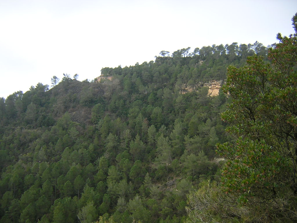 La Pedrera de Mussarra, des de sota (Monistrol de Calders, Moianès)